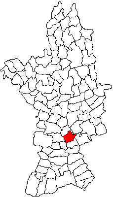 Categorie:Hărţi ale judeţului Olt